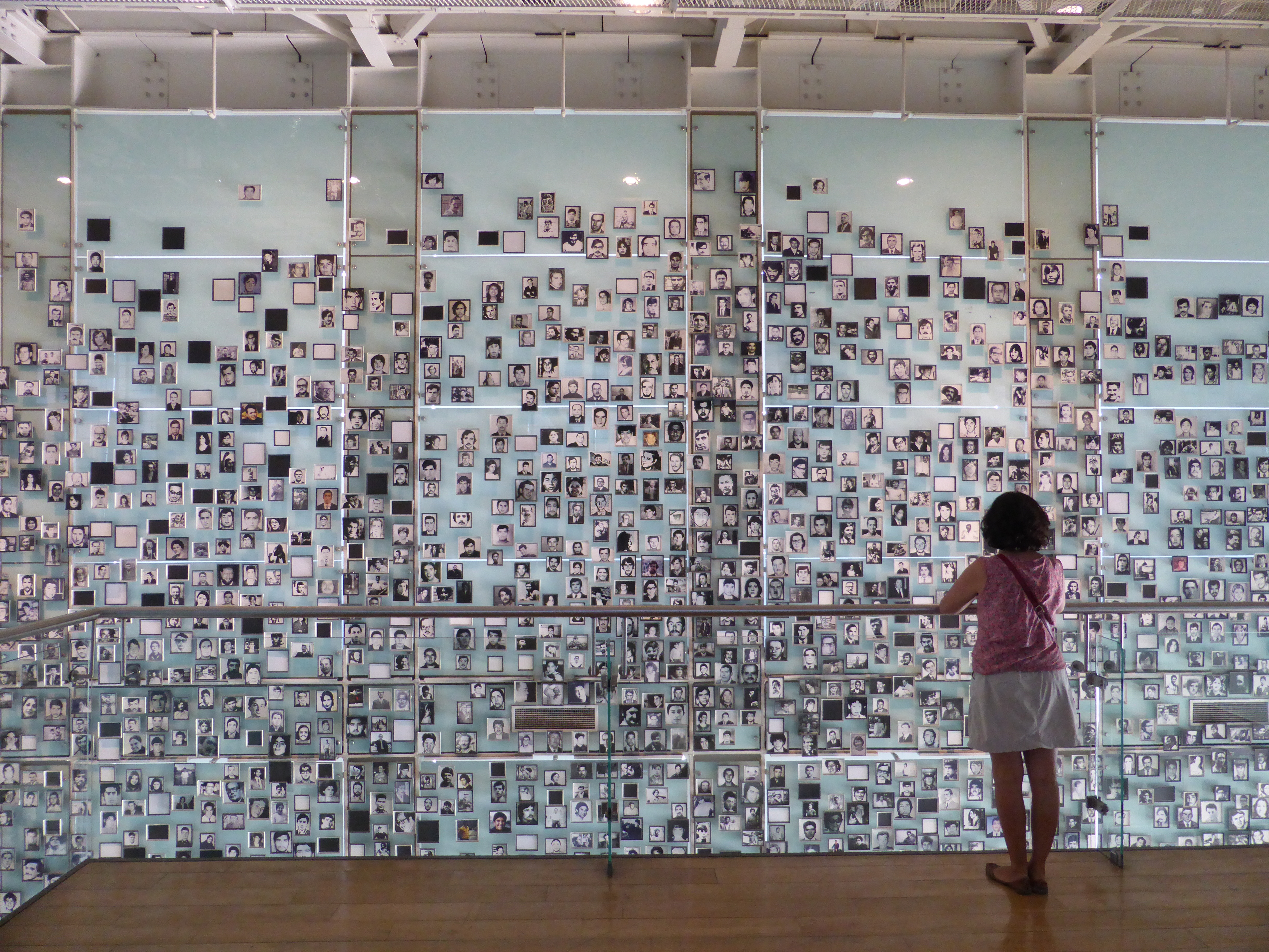 Algunos rostros de víctimas de la dictadura chilena (años 1973-1990).